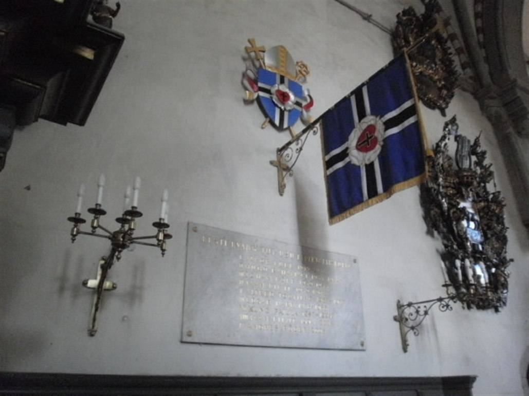 Kooriruum, seinal EELK peapiiskopi lipp. Oktoober 2012.